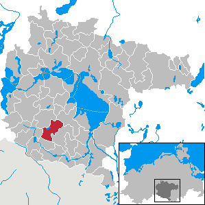 Bütow in Mecklenburg-Western Pomerania - District Müritz